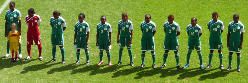 FIFA U-20-Fußballweltmeisterschaft der Frauen, Nationalmannschaft Nigeria, Spiel 28 in Augsburg